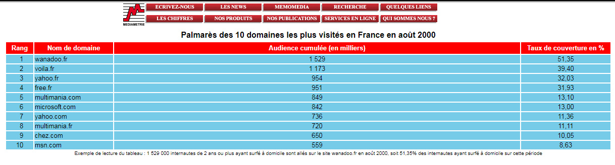 Template:Statistiques web Aout 2000